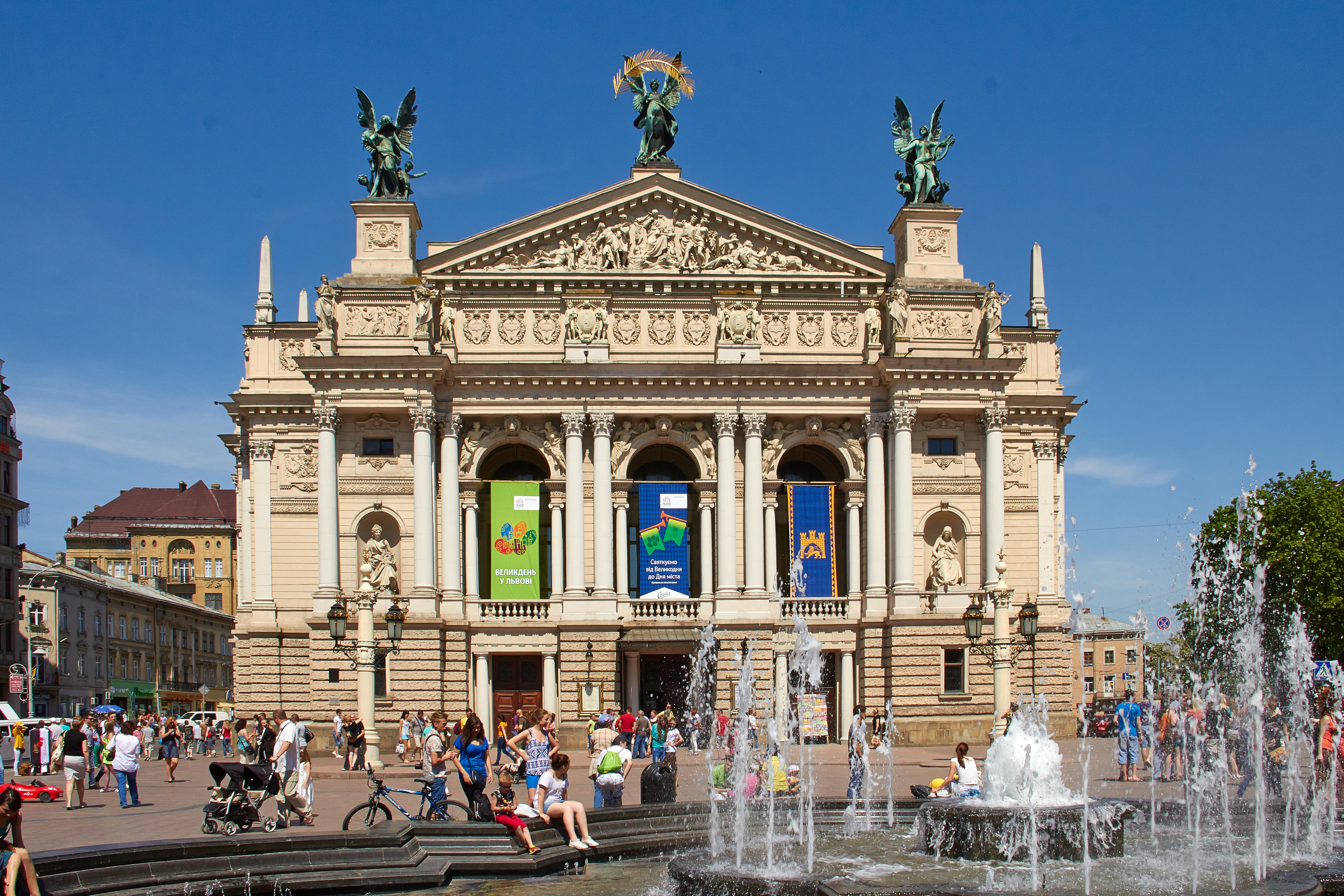 Львовский оперный театр